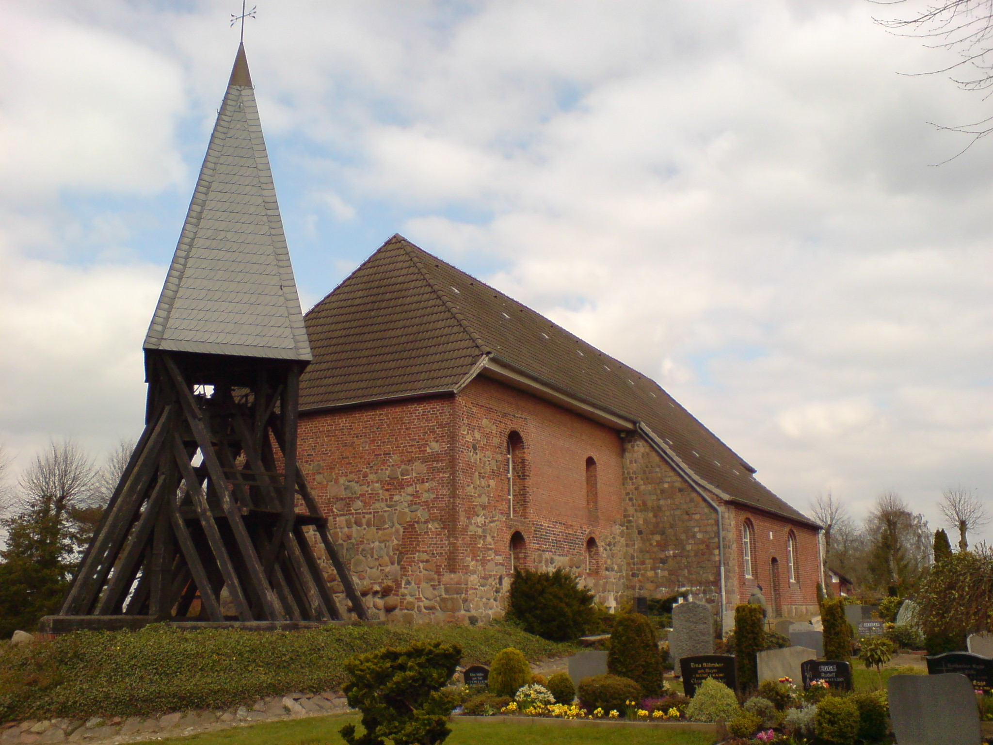 St.-Michaeliskirche, Hohenaspe